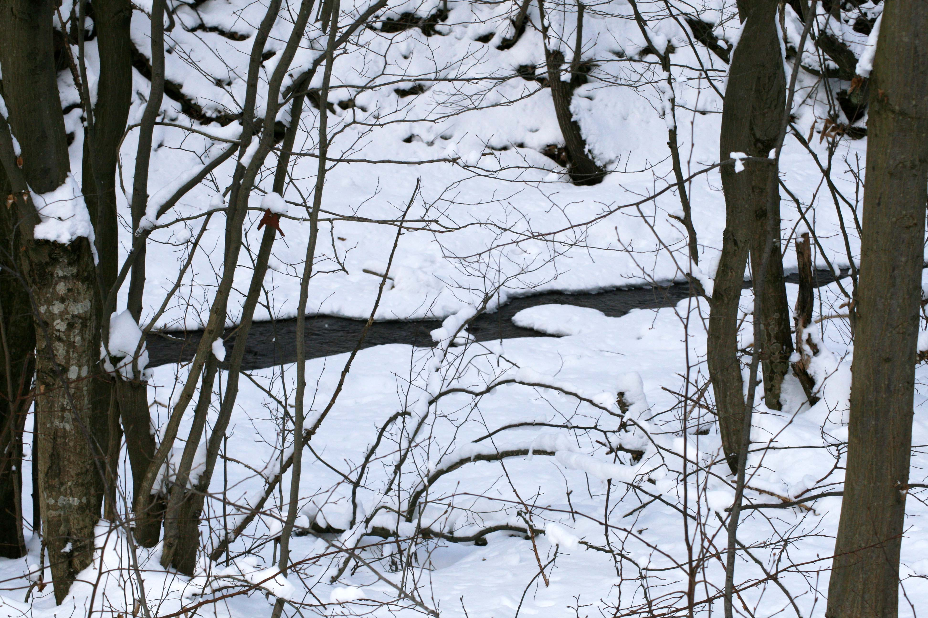 Príkranský potok v januárovom období je spravidla vždy zamrznutý a vytvára zaujímavé prírodné zakutia